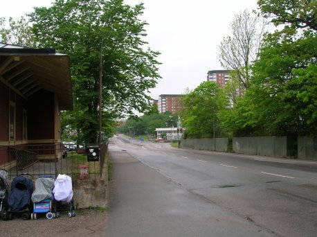 Värmdövägen vid Nacka station. Fotograf : Jordgubbe, public Domain Kategori:Bilder från Nacka